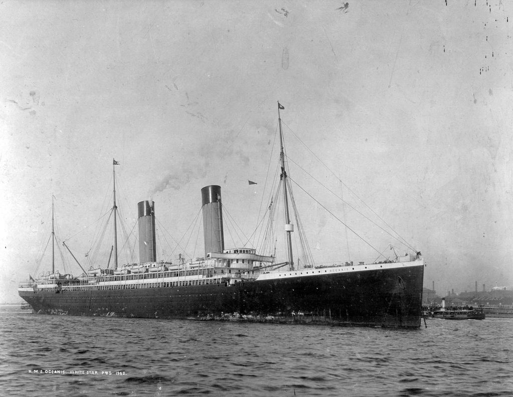 El buque RMS Oceanic de la naviera White Star Line.